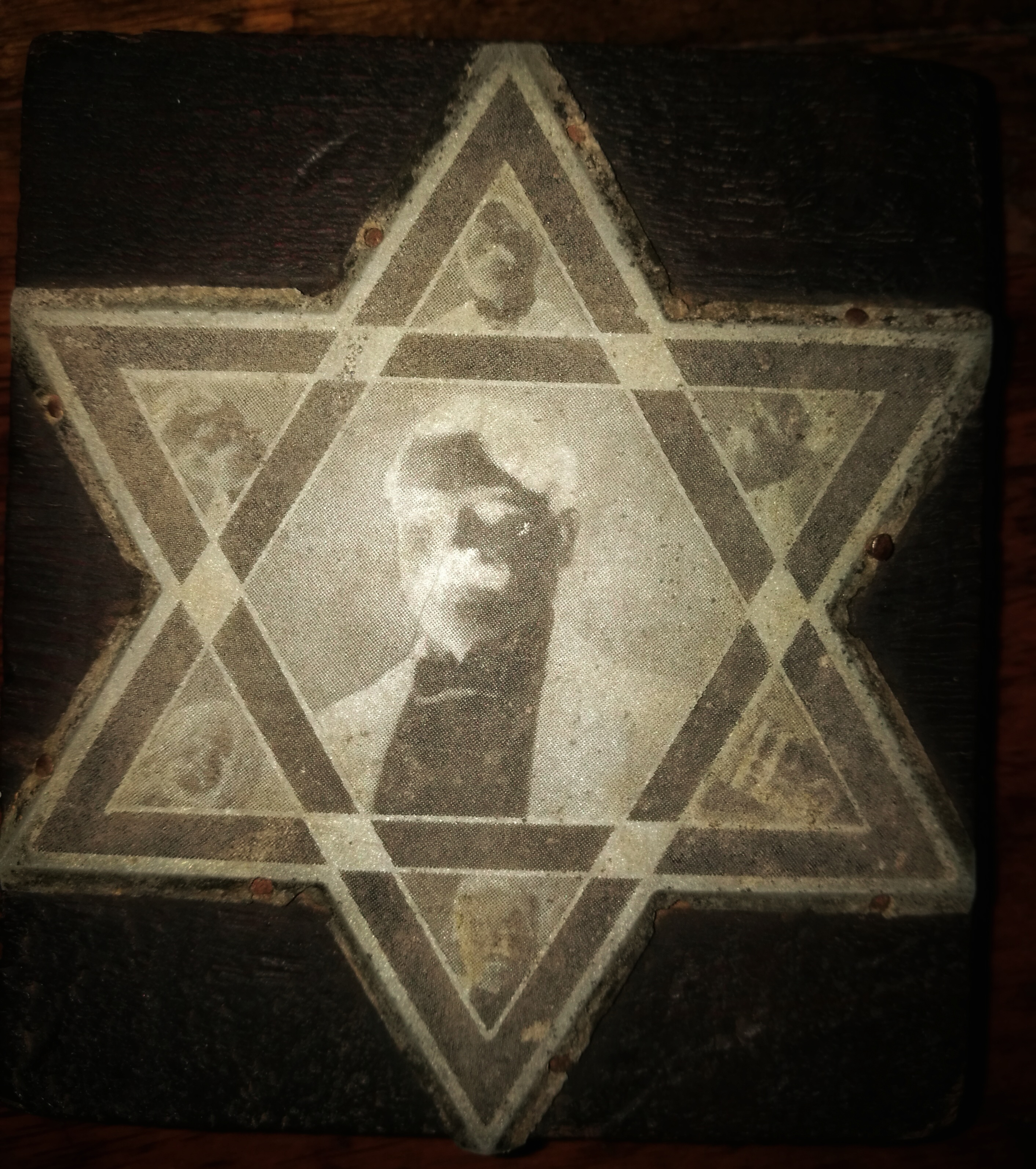 Elemento utilizado en la década de 1920